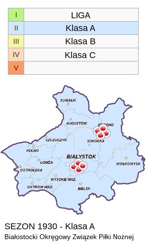 Jagiellonia w sezonie 1930 - mapa